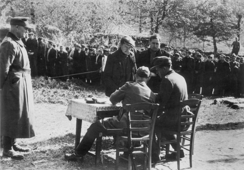 Scherl: Kampf gegen die Terroristen in Frankreich. In einigen Teilen Frankreichs versuchen kommunistische Terrorgruppen immer wieder, die deutschen Sicherungsmassnahmen zu stören. Durch schlagartig durchgeführte Aktionen wird aber den Terroristen das Handwerk gelegt und fast täglich berichtet der Wehrmachtbericht von den Erfolgen gegen die Saboteure. Wieder wurde in ein Dorf in der Bretagne eine Terroristengruppe gestellt. Auf dem Marktplatz finden die ersten Vernehmungen statt. P.K. Koll, 3.8.44 [Herausgabedatum]